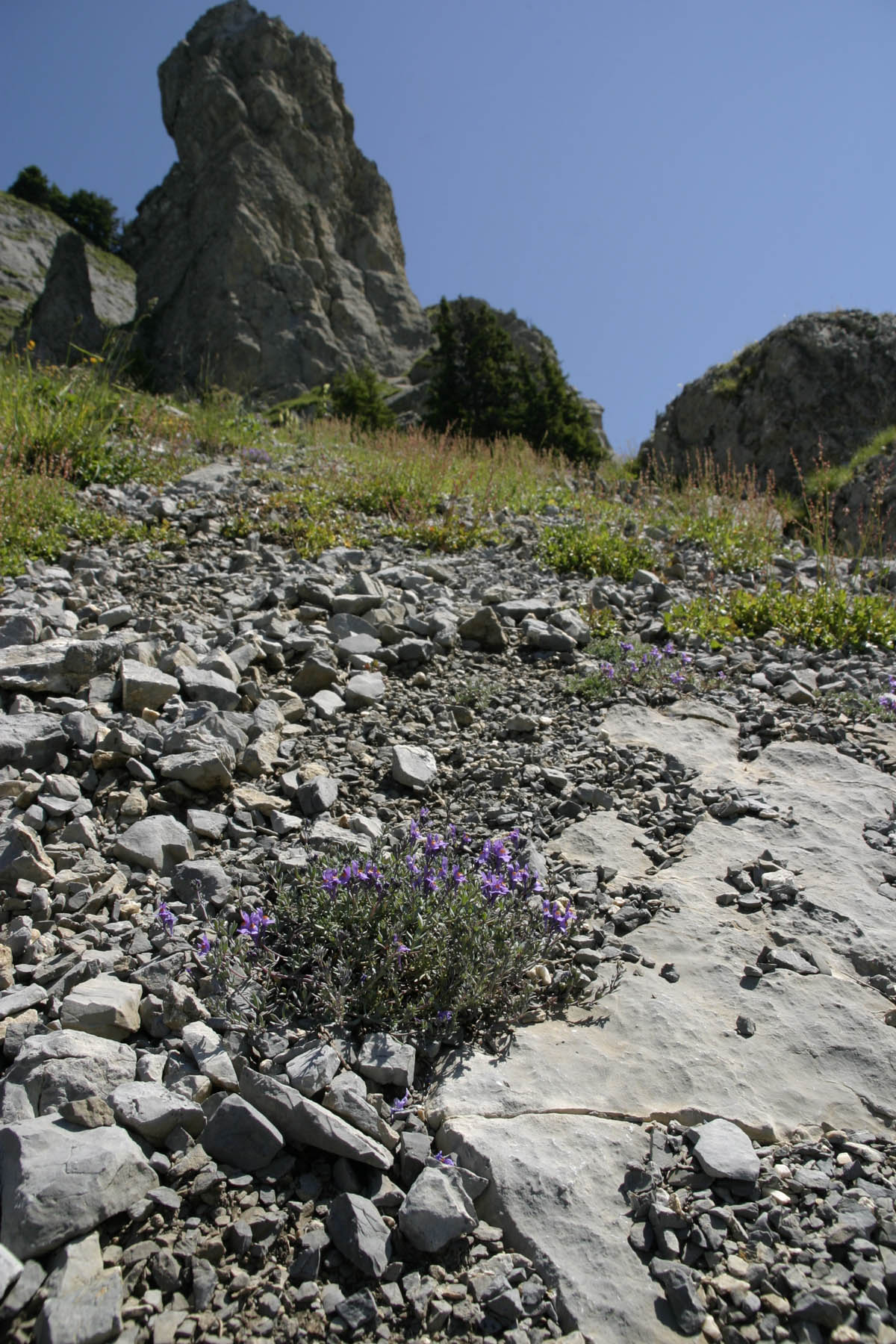 Phänologie einer Kalkschuttflur in den Schweizer Nordalpen. Alpen-Leinkraut (Linaria alpina), Schynige Platte, Kanton Bern